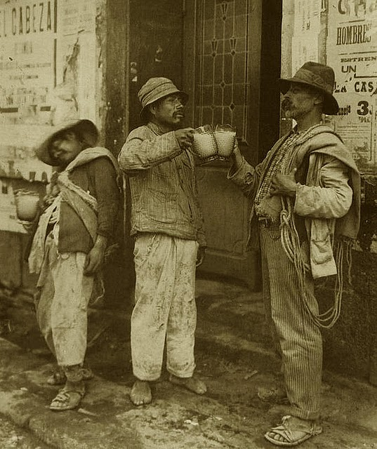 mecapaleros secundino mancera (izquierda) jose carmen mancera (derecha) vecinos de san pedro atocpan tomando pulque en la merced